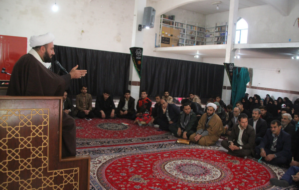 مسجد امیرالمونین روستای بلوران-کوهدشت-لرستان